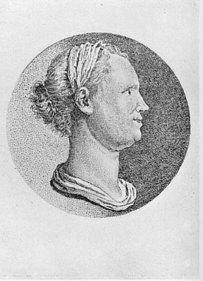 Anna Luise Karsch (1722-1791) Dichterin, die Goethe ein Einladungsgedicht am 18.Mai 1788 n den Gasthof gesandt hatte.